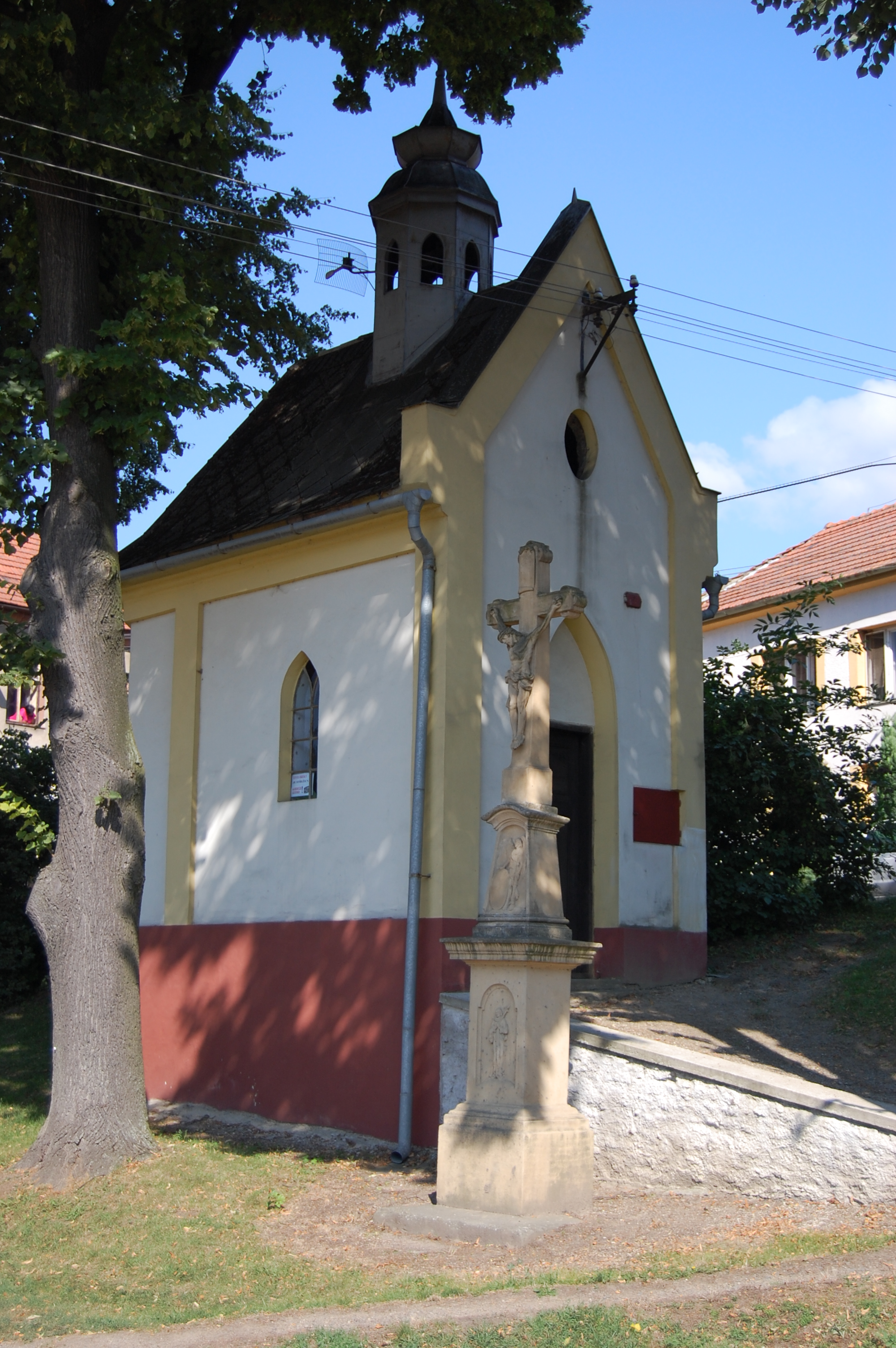 Kaple ve Studenci - pohled zepředu, Čelechovice na Hané, okres Prostějov